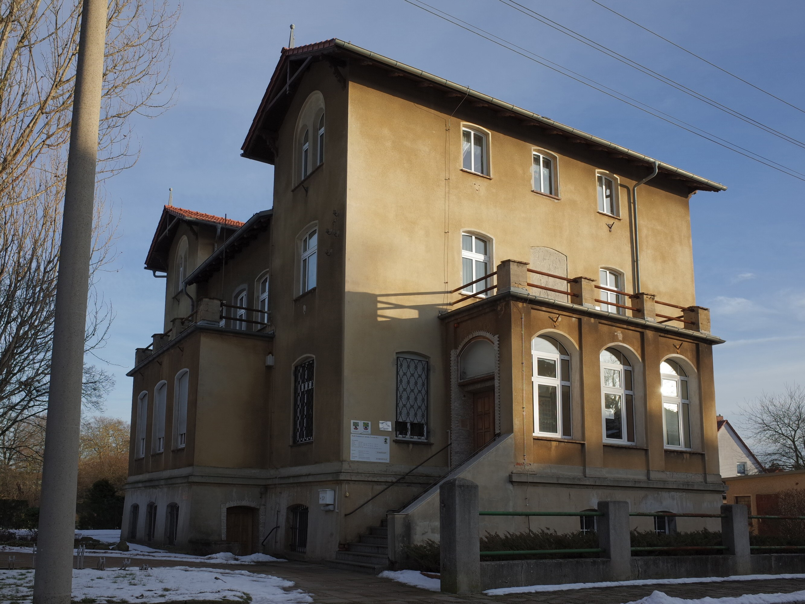 Oranienbaum, Franzstraße 1.Rathaus, Hauptsitz der Stadt Oranienbau-Wörlitz (Baudenkmal im Denkmalverzeichniss Sachsen-Anhalt, Erfassungsnummer: 094 40421 000 000 000 000 [1])